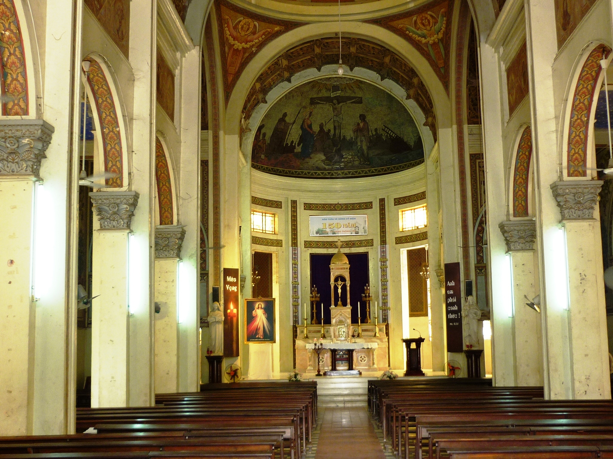 Cung thánh và gian lồng chính của nhà thờ